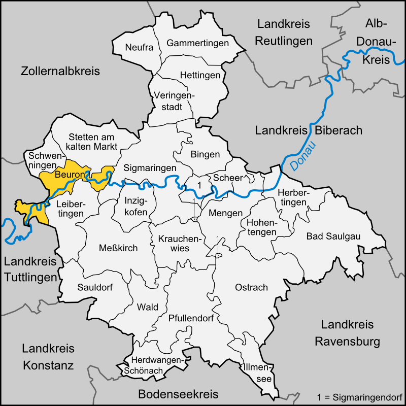 Karte der Gemeinde Beuron im Landkreis Sigmaringen